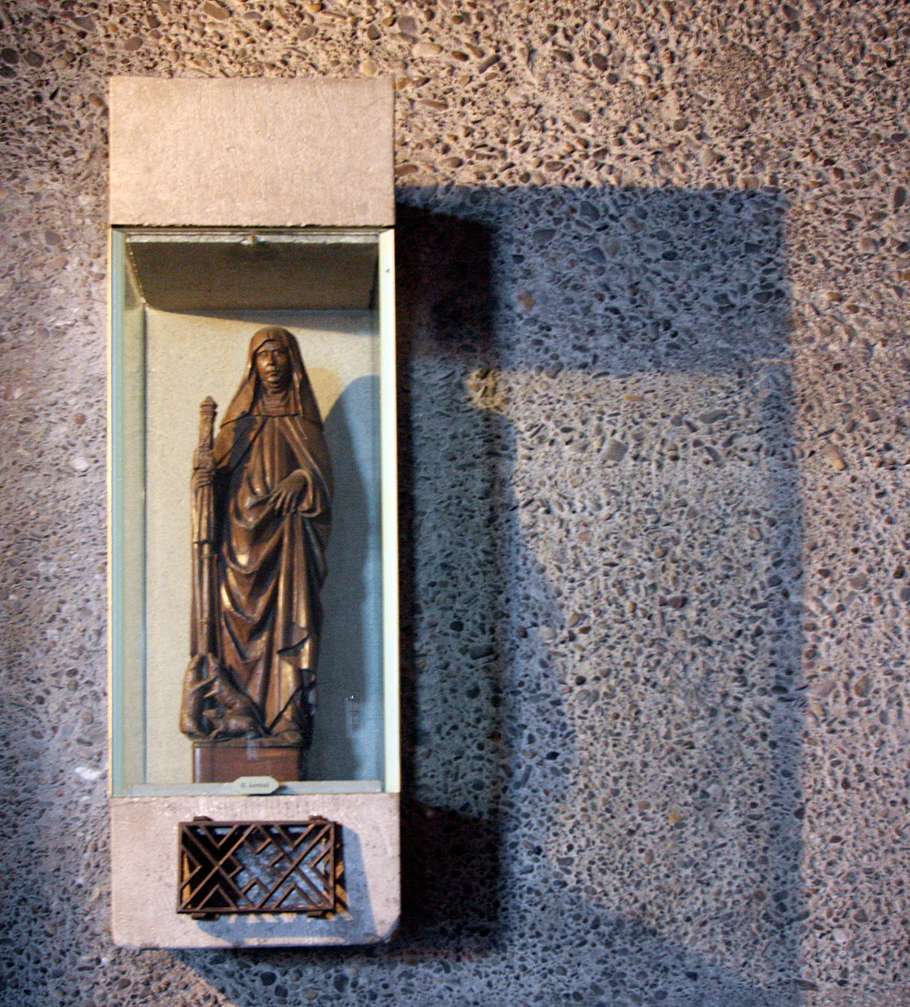 Katholische Kirche St. Gertrud in Köln, Innenraum: Spätgotische Skulptur St. Gertrud von Nivelles